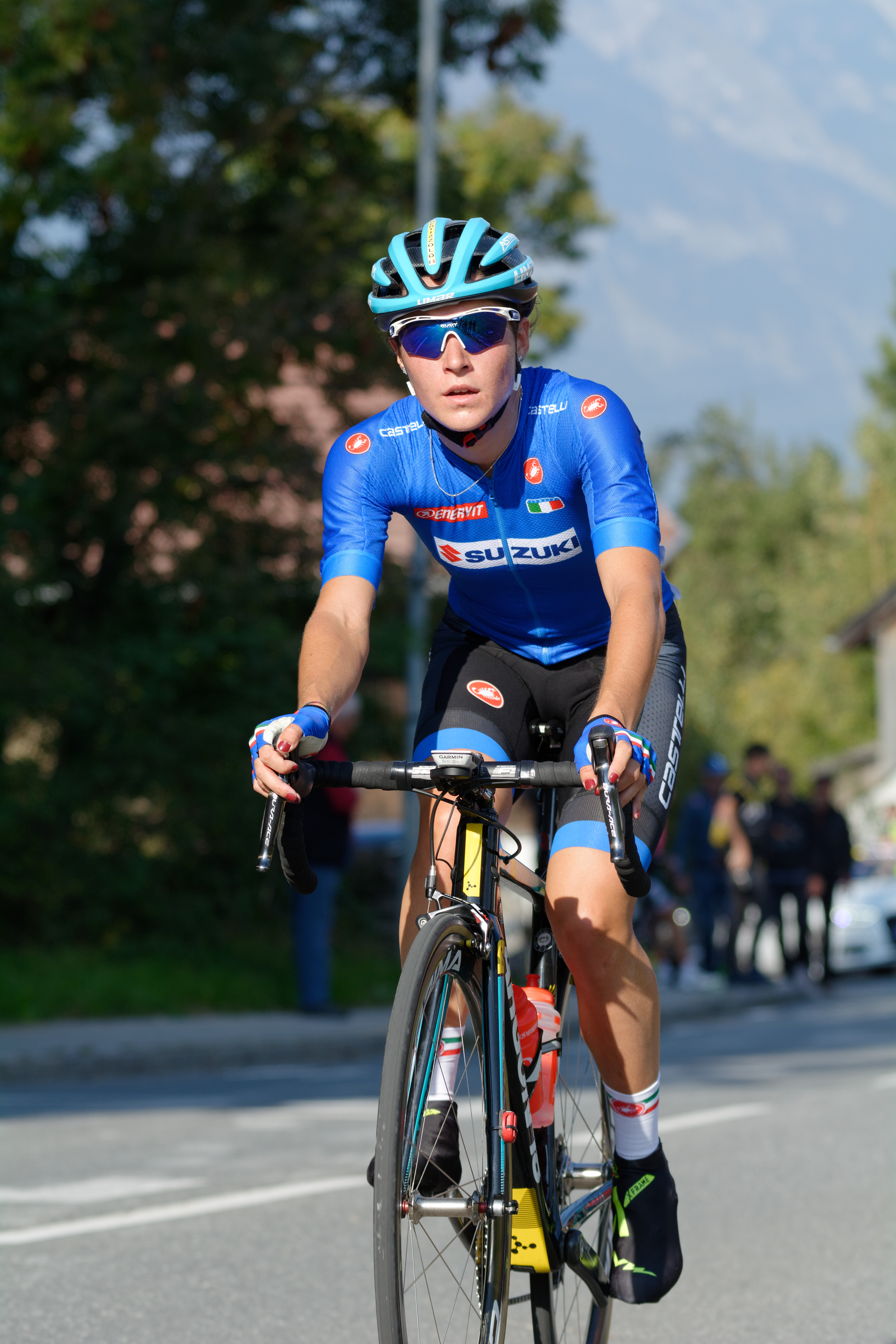 D71_6038_DxO